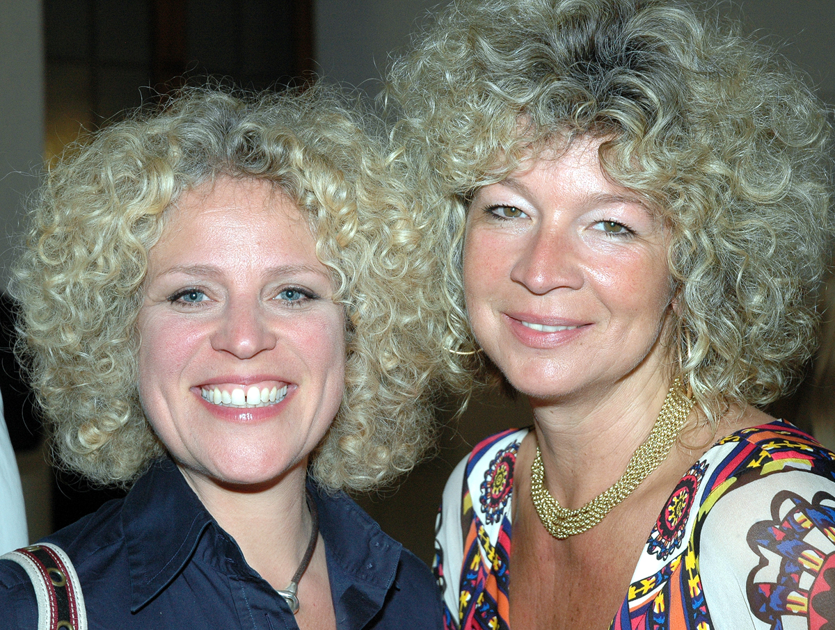 Christiane Brammer (links) und Susanne Rohrer bei einem Künstlerempfang im Alten Rathaus in München